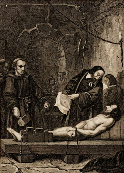 Gravure représentant le supplice des brodequins subit par Urbain Gandier. De Jean-Baptiste Reville (1767-1825)